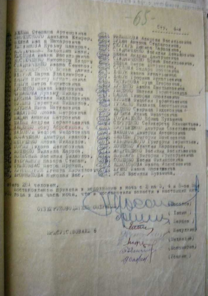 Четвертая страница Акта о расстреле 281 человека 3-го, 4-го и 5-го мая 1933 года в Омской области по делу о "заговоре в сельском хозяйстве"